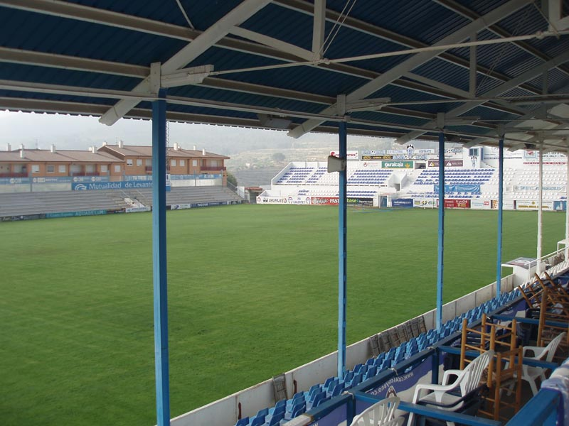 Estadio "El Collao" del Club Deportivo Alcoyano, en Alcoy (Alicante).